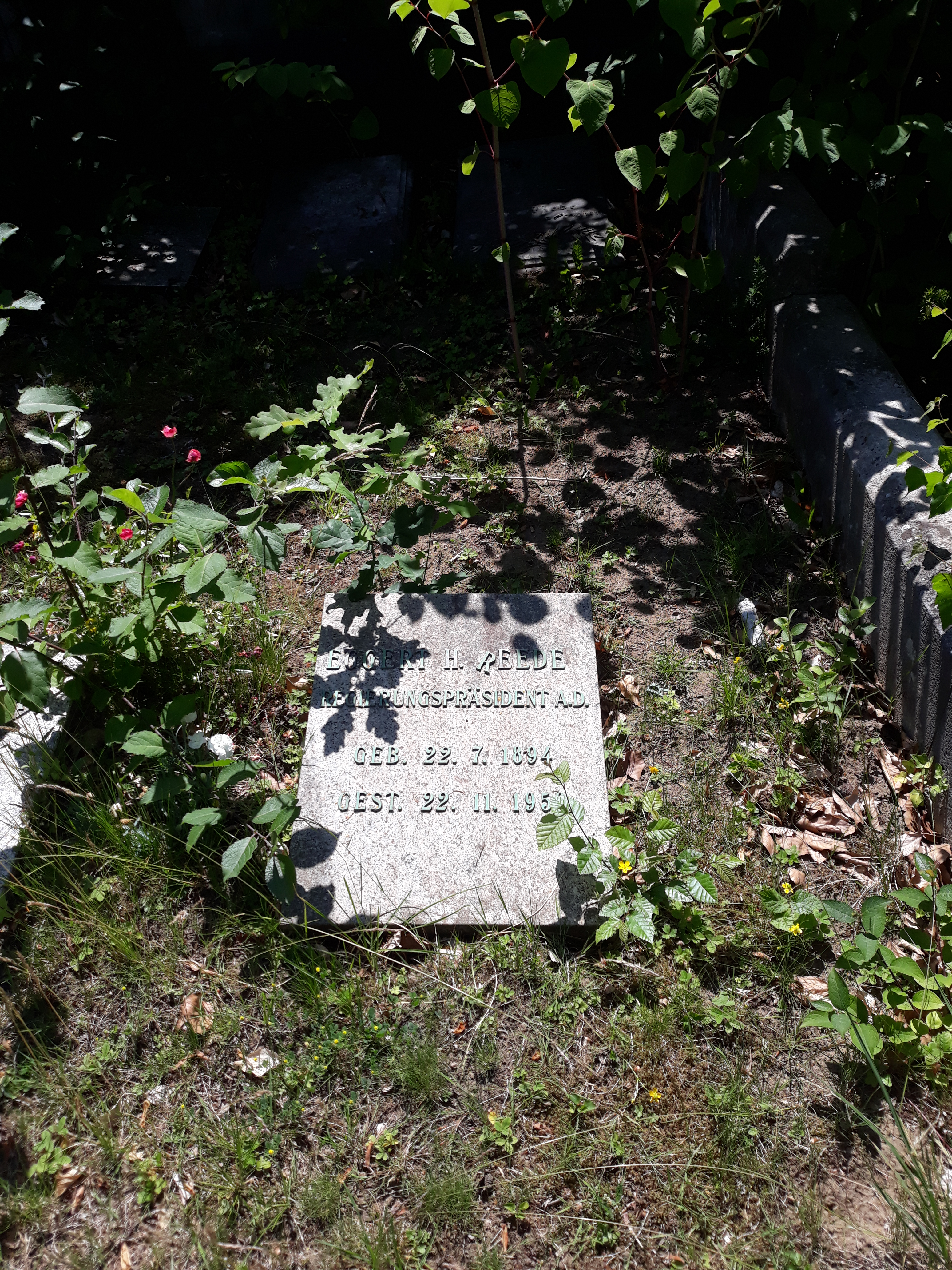 Das Grab des deutschen Verwaltungsbeamten und SS-Führers Eggert Reeder auf dem Reformierten Friedhof Hochstraße in Wuppertal-Elberfeld.